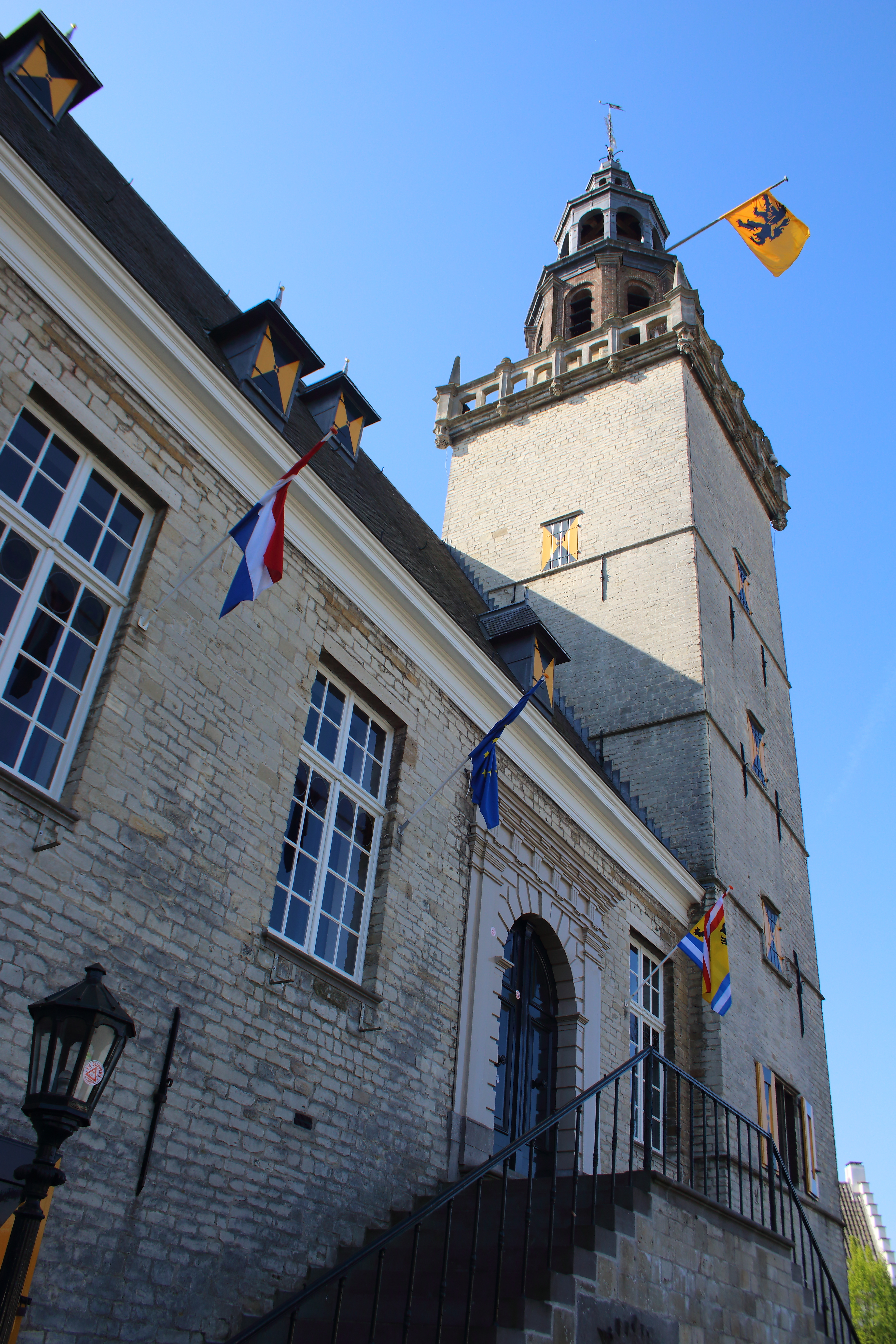 Stadhuis van Hulst, Zeeuws-Vlaanderen, Zeeland, Nederland